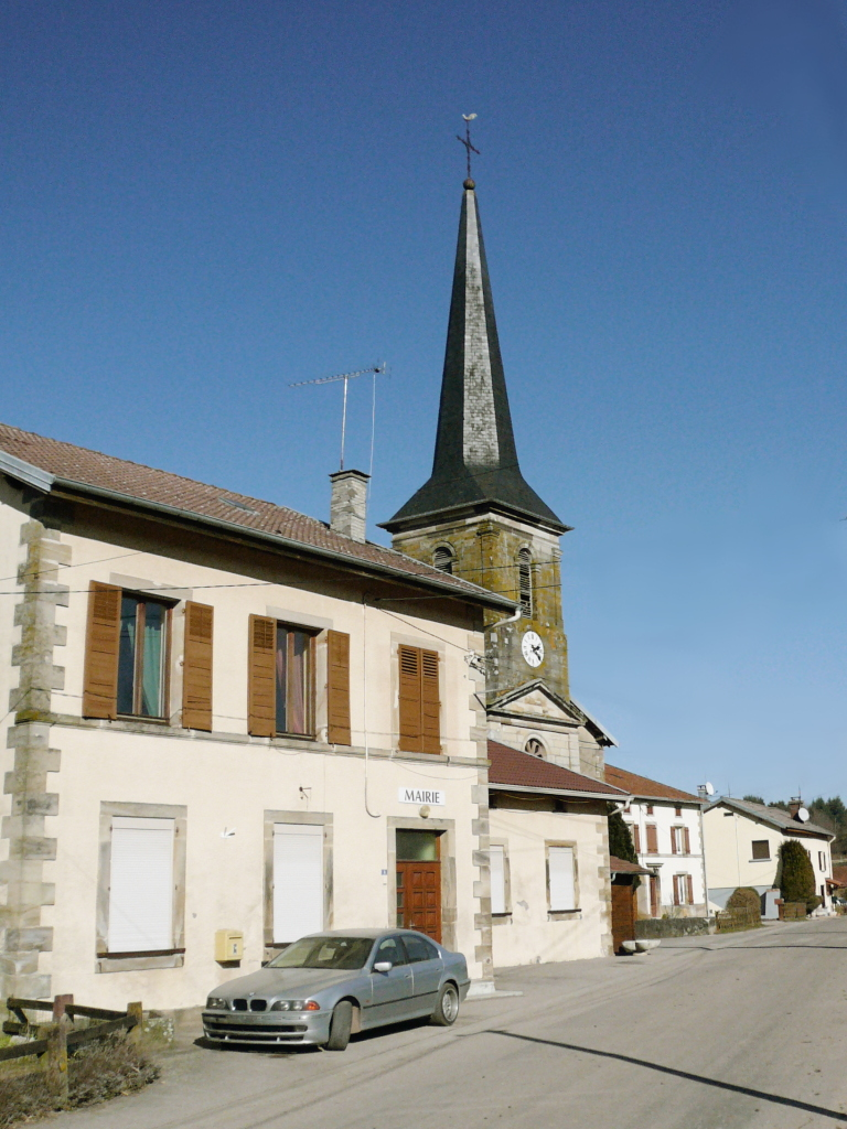 Méménil Le centre du village Commune du canton de Bruyères (Vosges) Photo personnelle du 10 juillet 2006. Copyright © Christian Amet